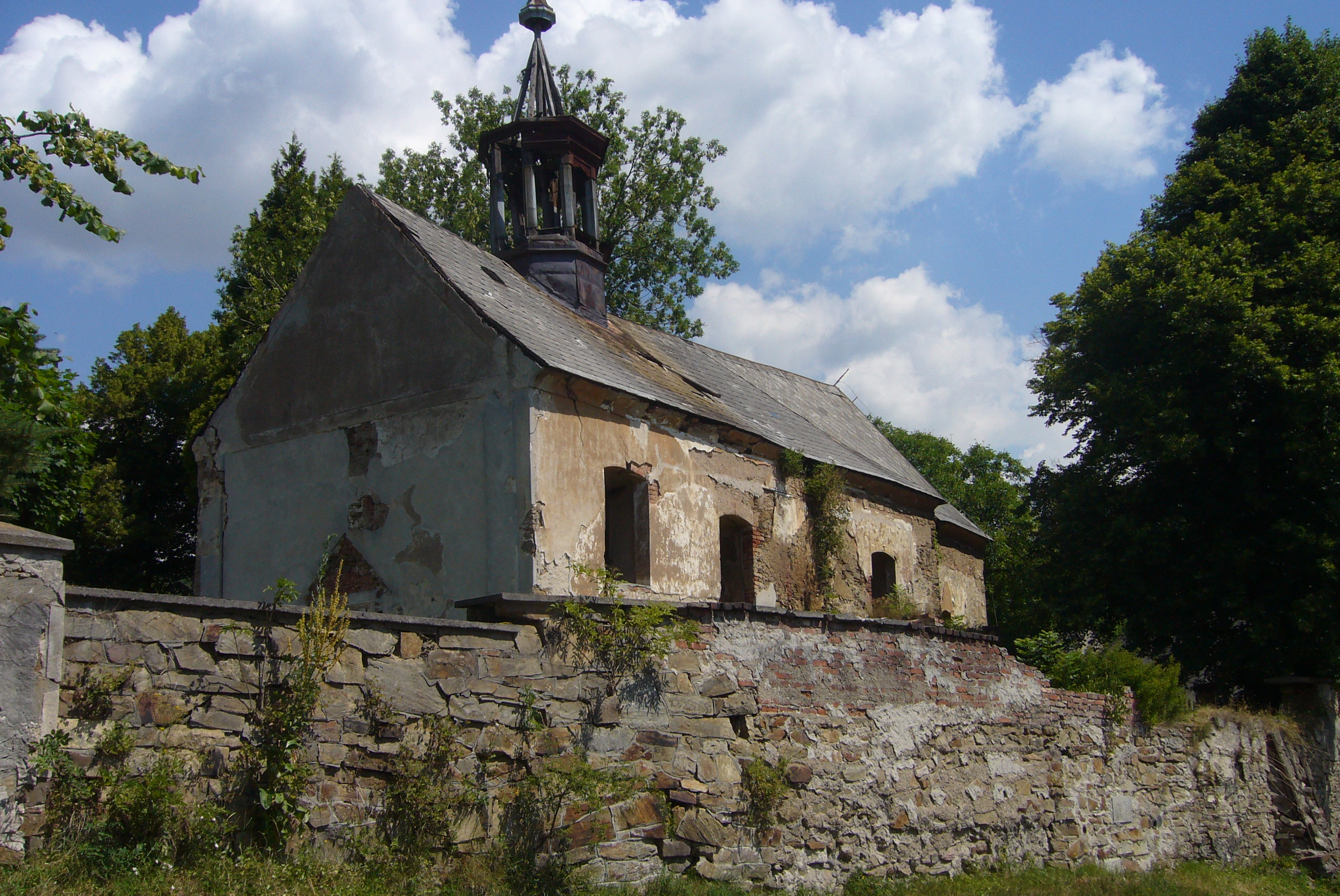 Kostel svatého Jakuba